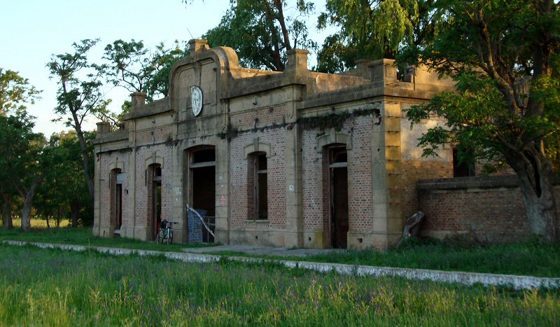 Estación Buchanan del FCGB, ex FFCC CGBA, ramal Conzález Catán - La Plata